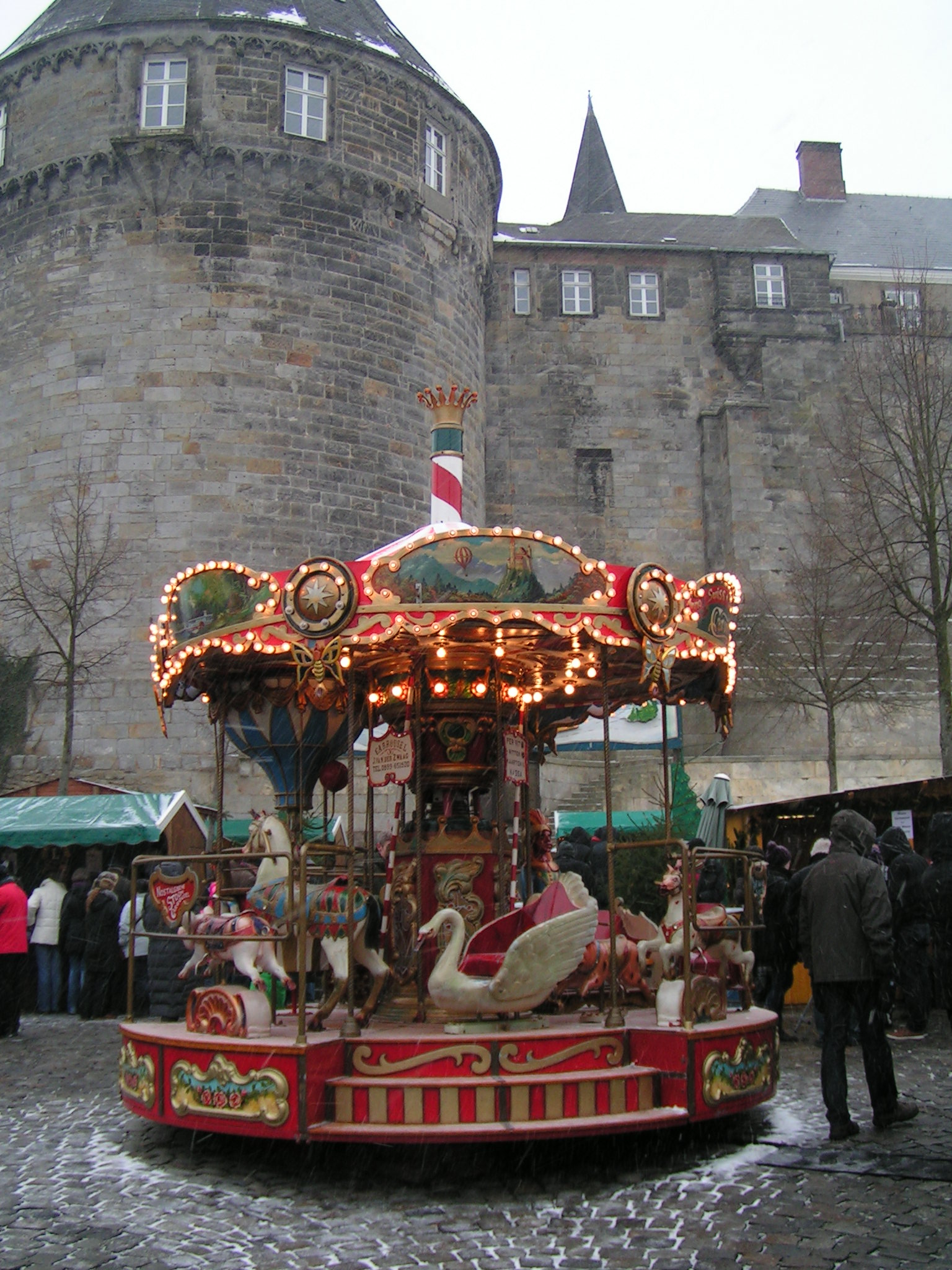 Dampfkarussell auf dem Weihnachtsmarkt Bad Bentheim. Im Hintergrund Burg Bentheim